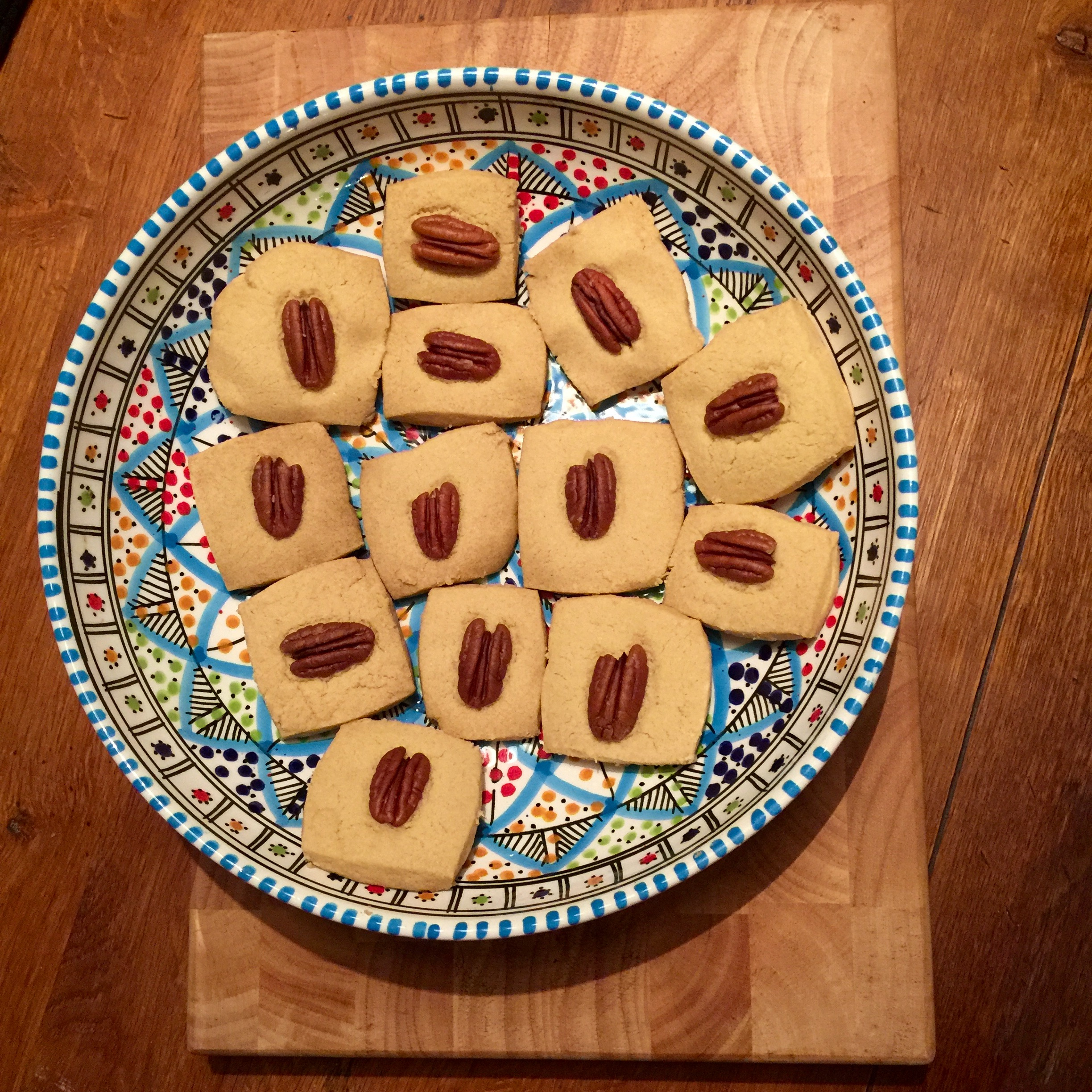 Tahini cookies